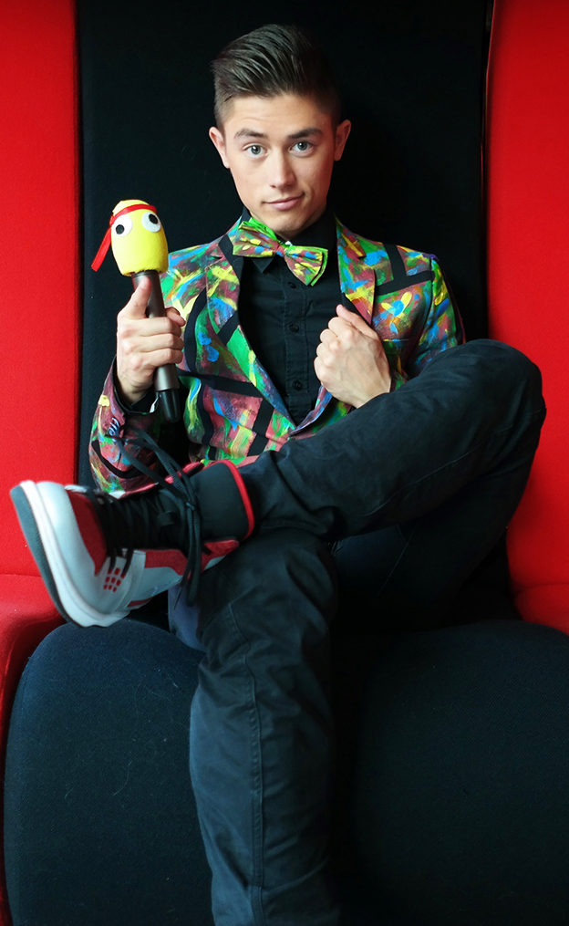 Fotografi från inspelningen av barnprogrammet "Fredagkväll med Alex" på SVT.